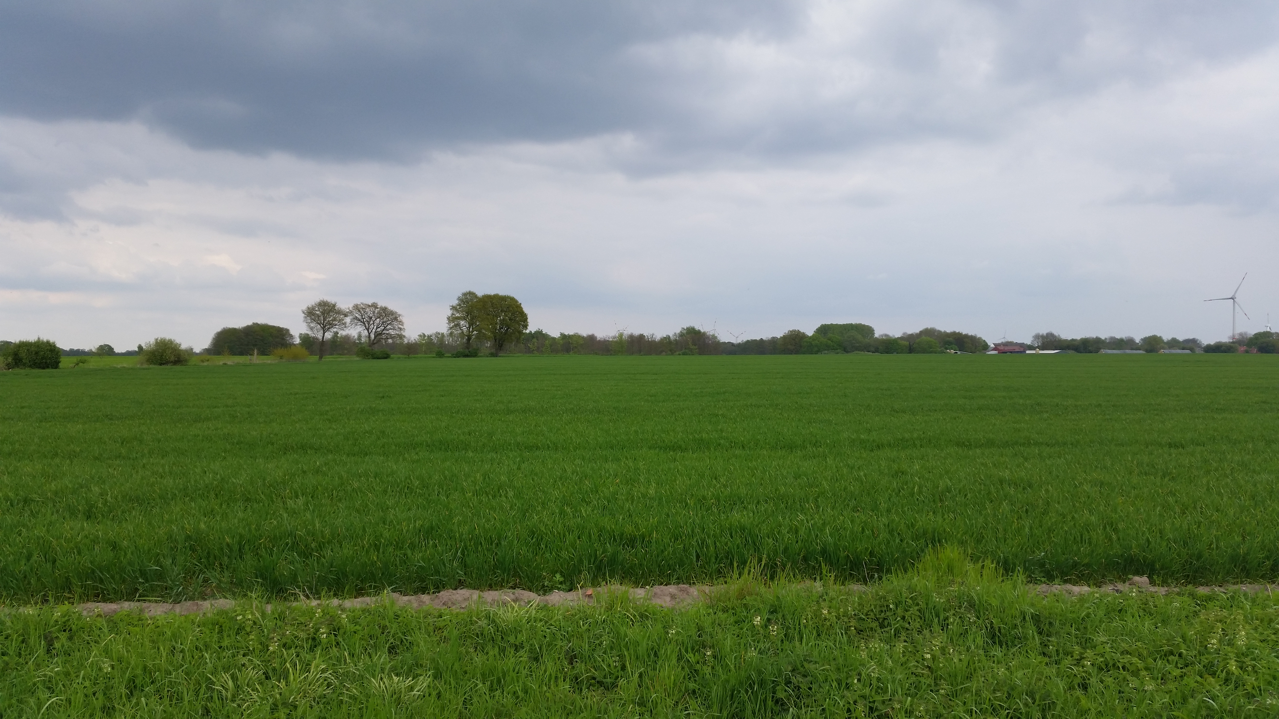 Schwege